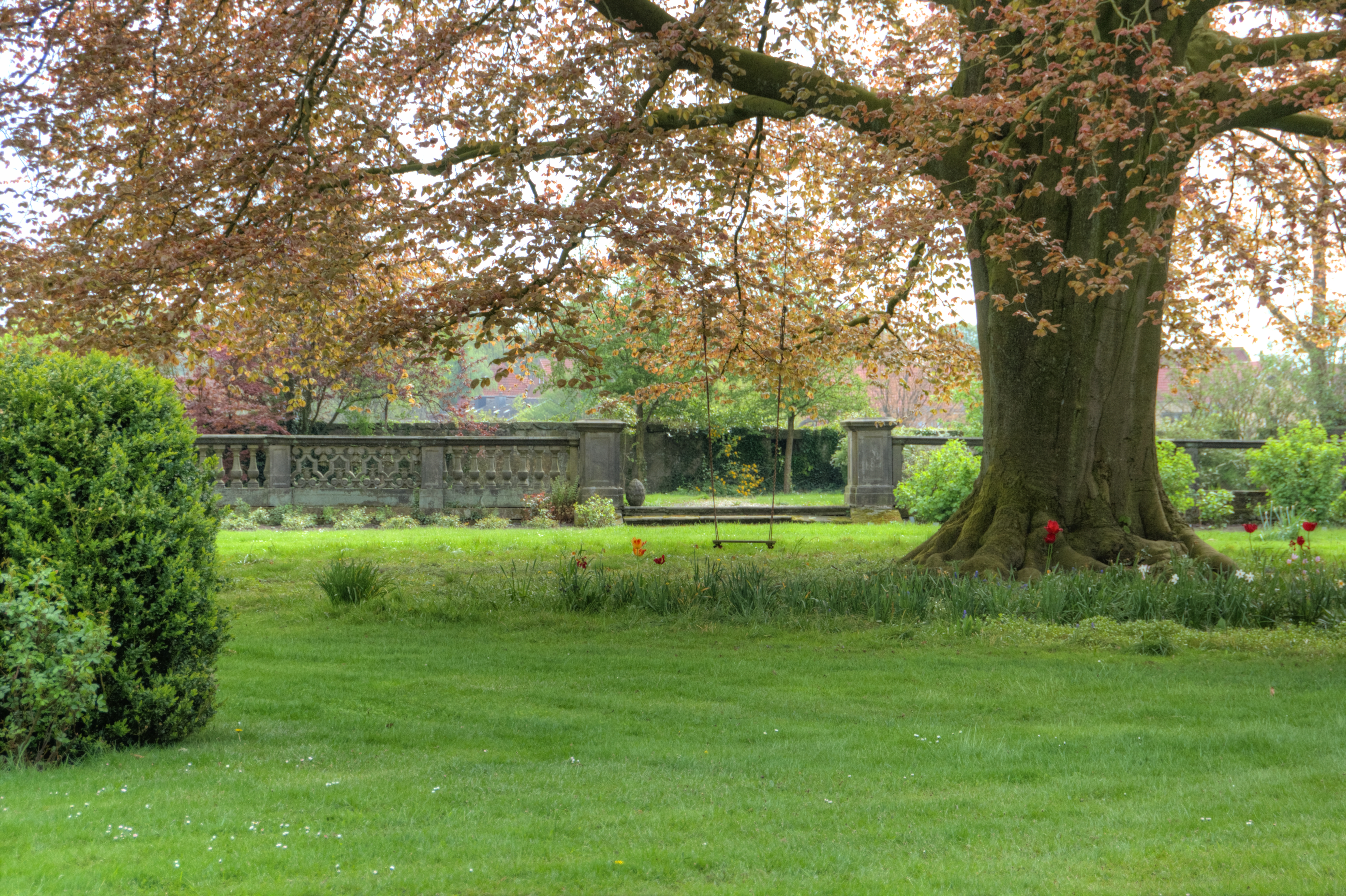 Prinzessinengarten in der Burg Bentheim